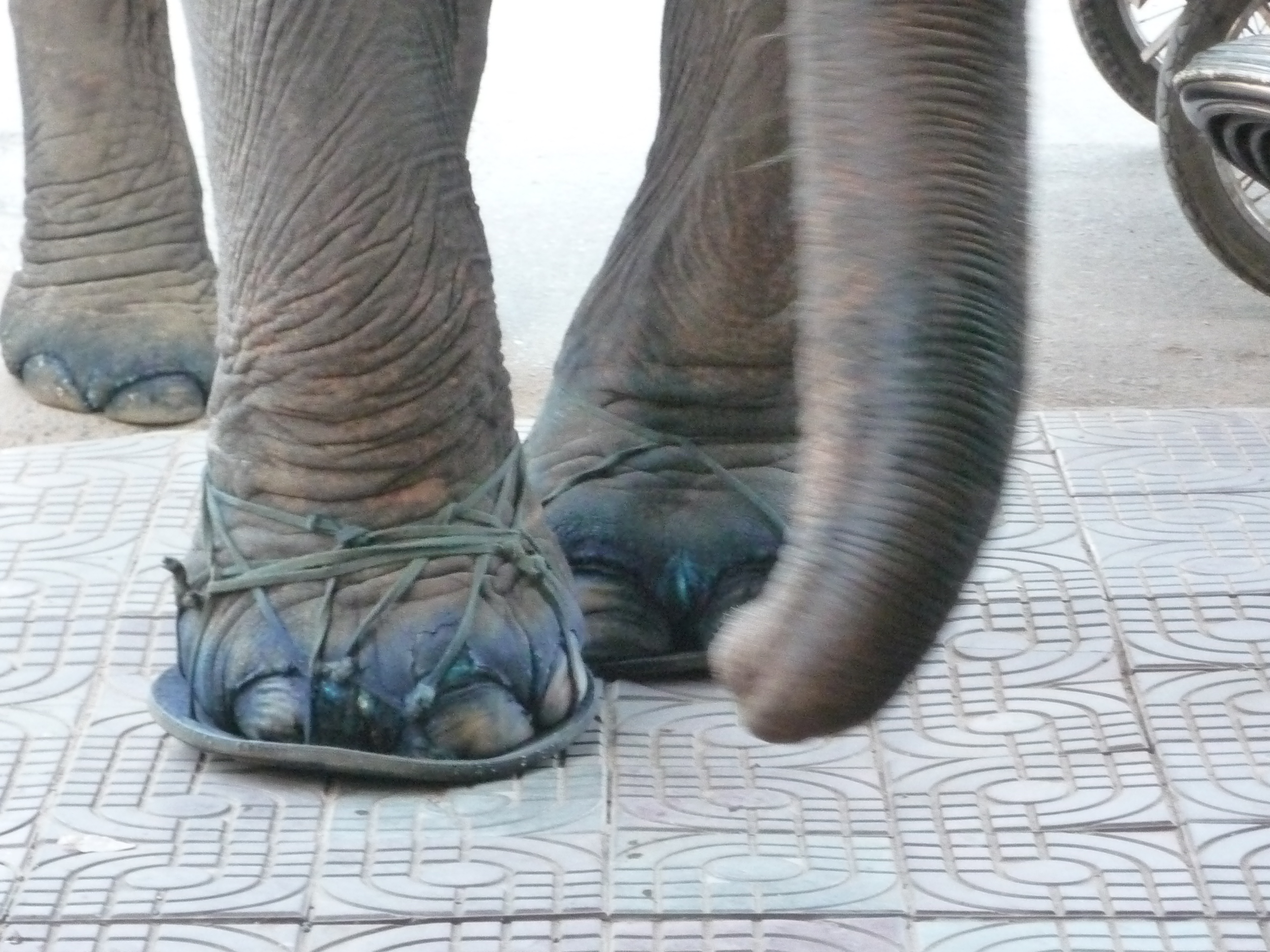 Phnom Penh